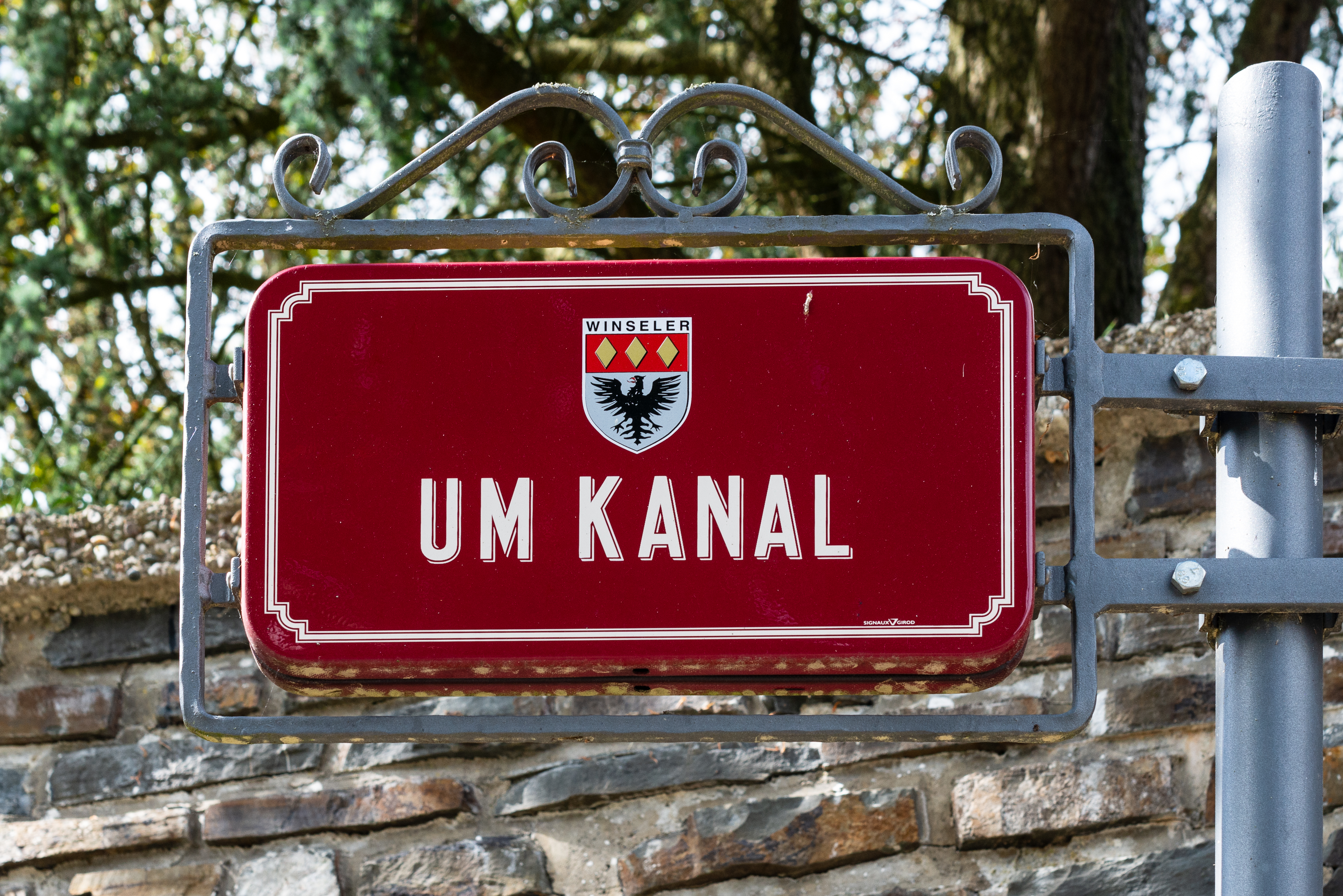 Stroosseschëld zu Soller.